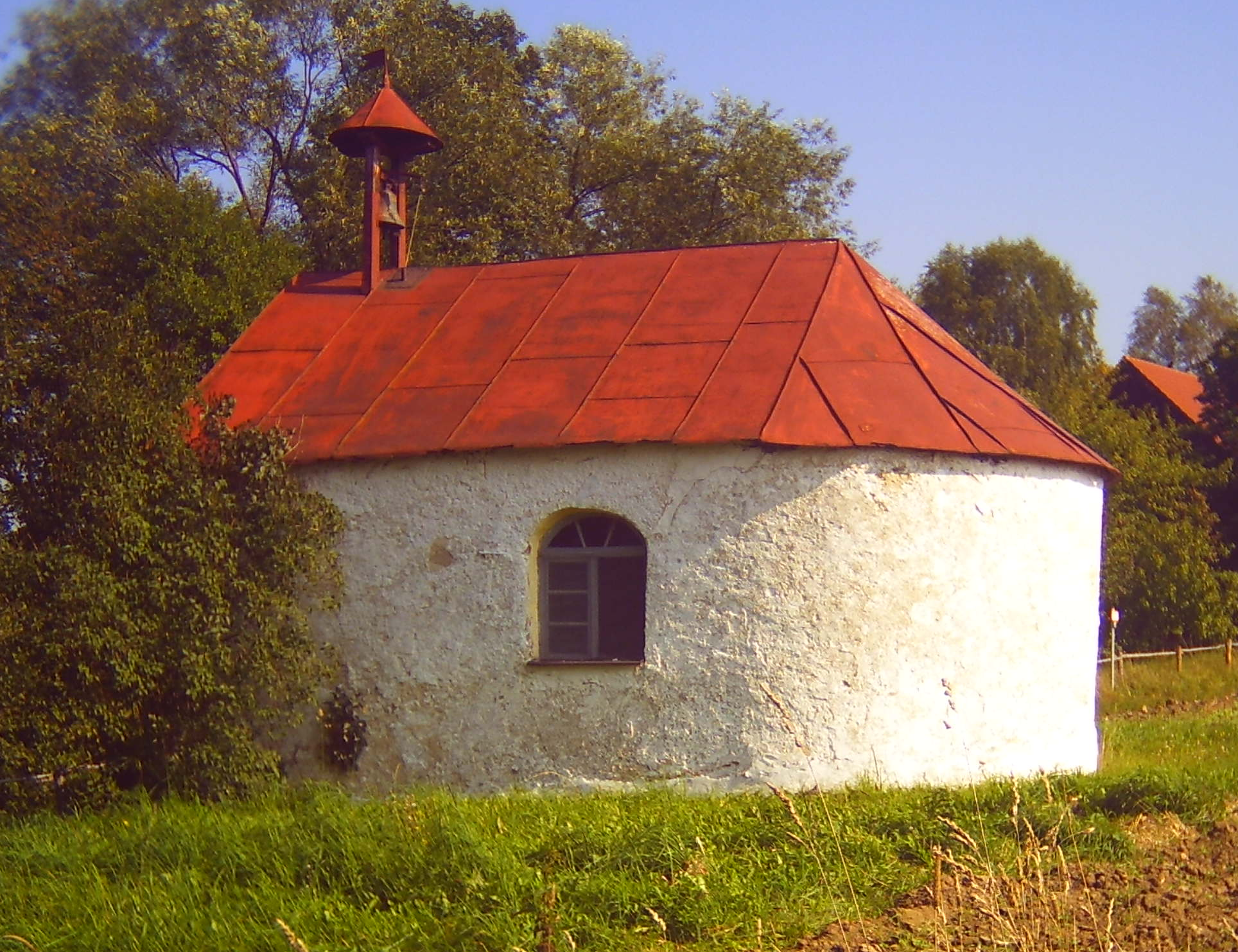 Sägmühlkapelle, Sägmühle, Weiding (Landkreis Schwandorf)